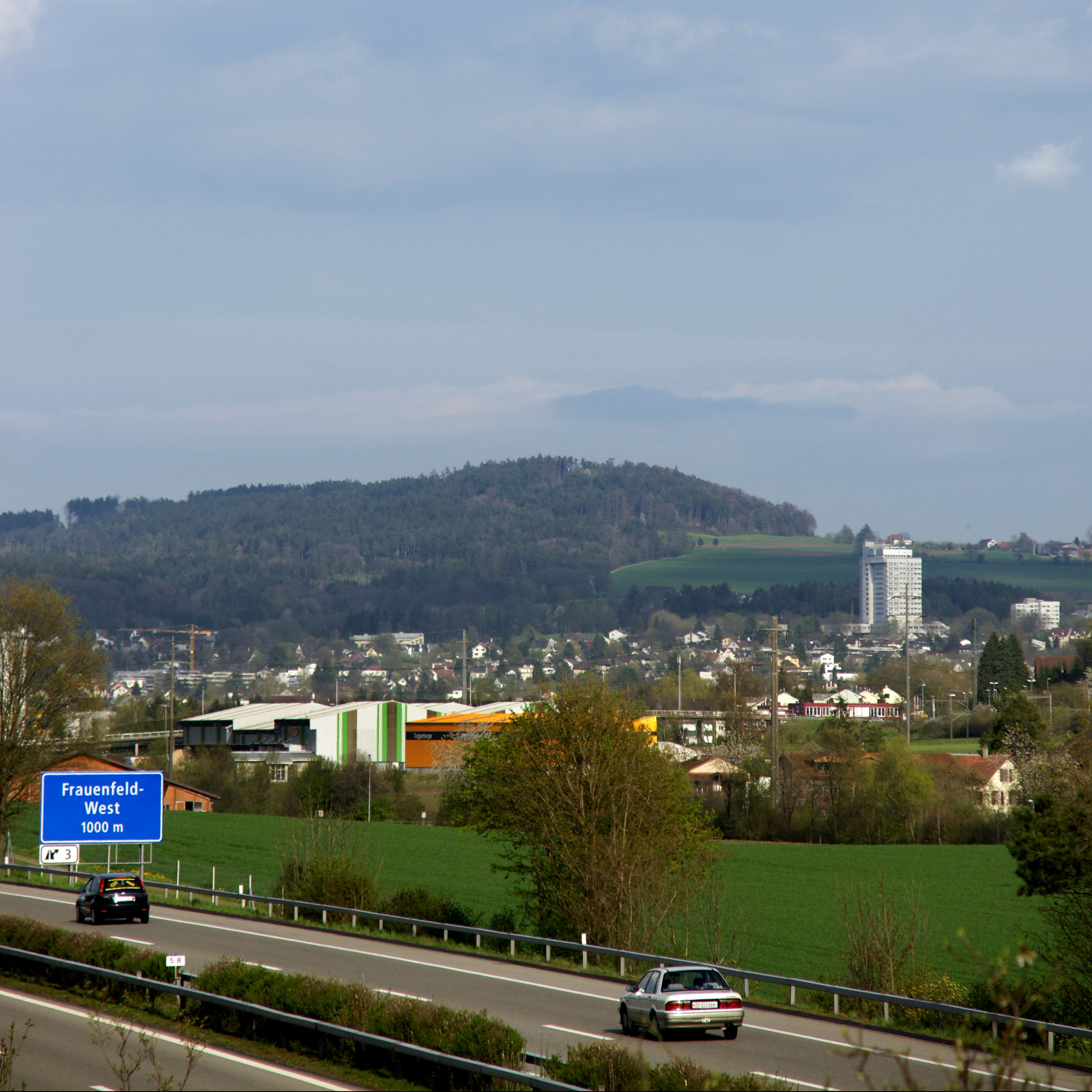 Frauenfeld West mit dem Stählibuck (653 müM) im Hintergrund. Rechts im Hintergrund das Hochhaus des Kantonsspitals. Aufnahmestandort: 706156 / 268065 (47° 33′ 16.99″ N, 8° 50′ 56.53″ E (47.554718°, 8.849037°))